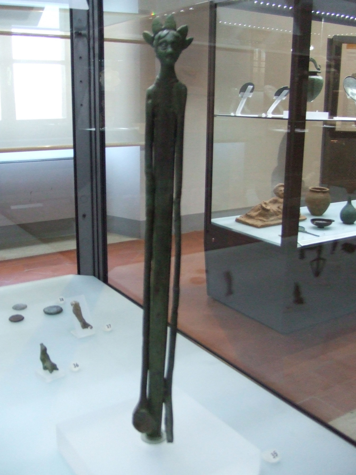 Musée national d'Archéologie de l'Ombrie de Pérouse - Statuette votive étrusque en bronze analogue à l'Ombra della sera du musée Guarnacci de Volterra